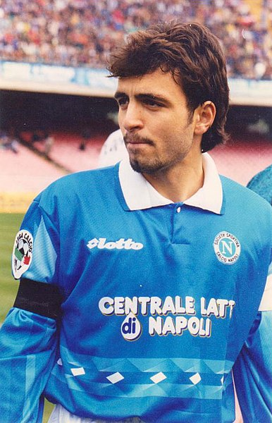 calciatore italiano